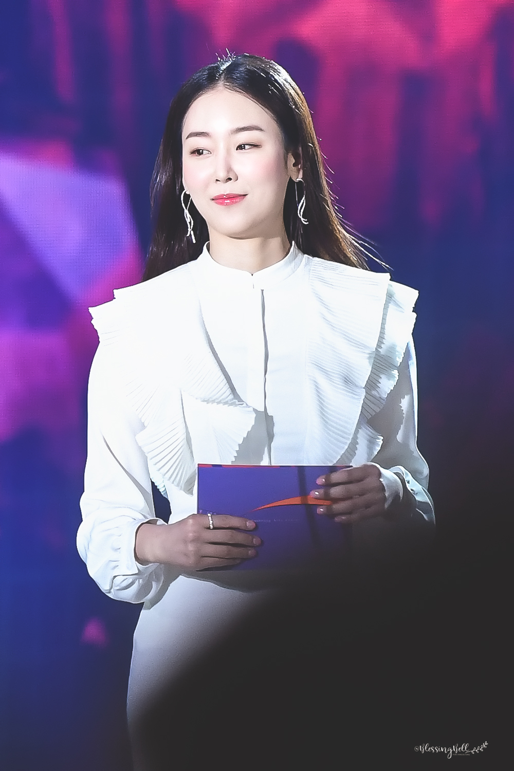 180503 54회 백상예술대상